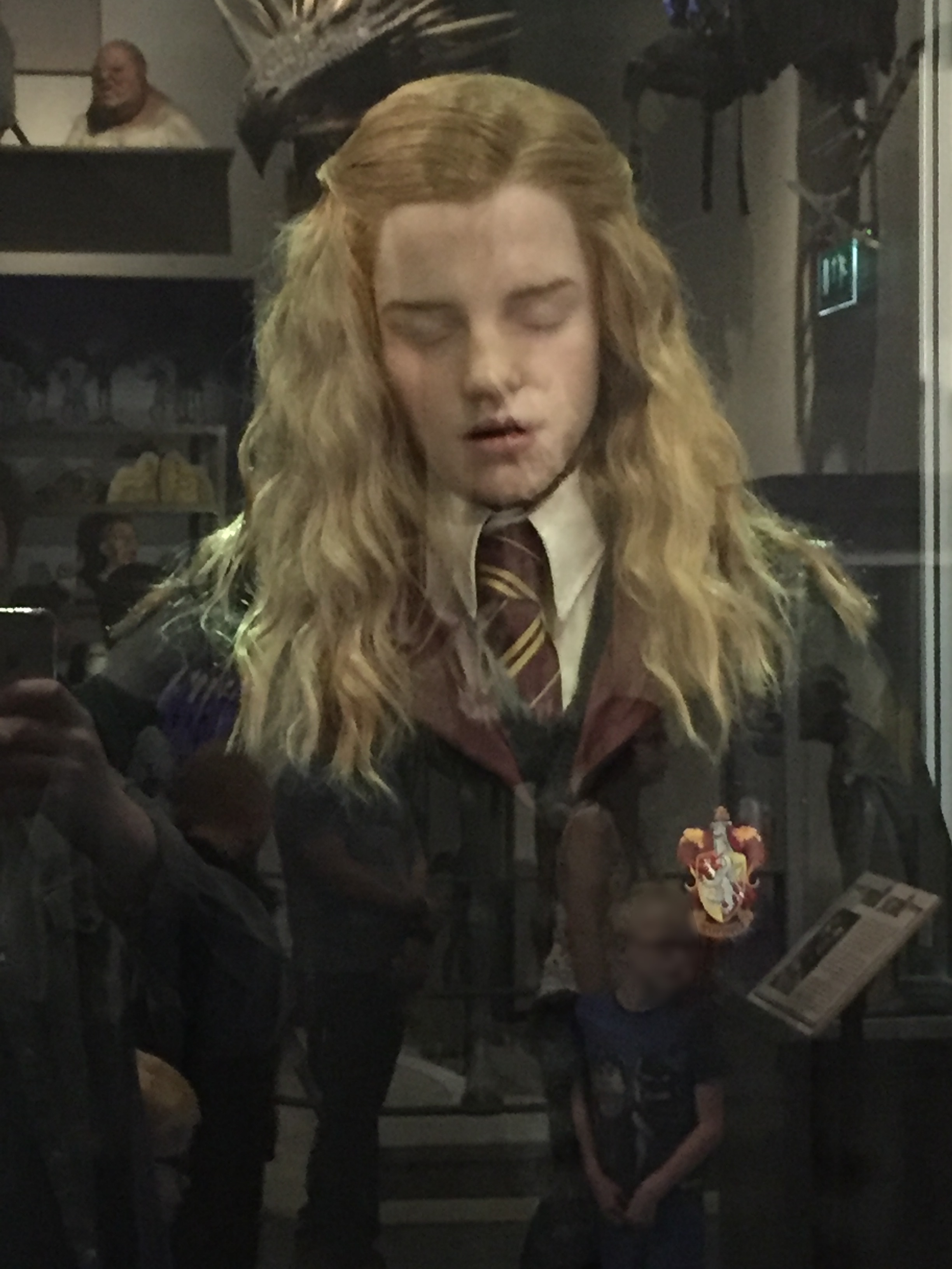 statue